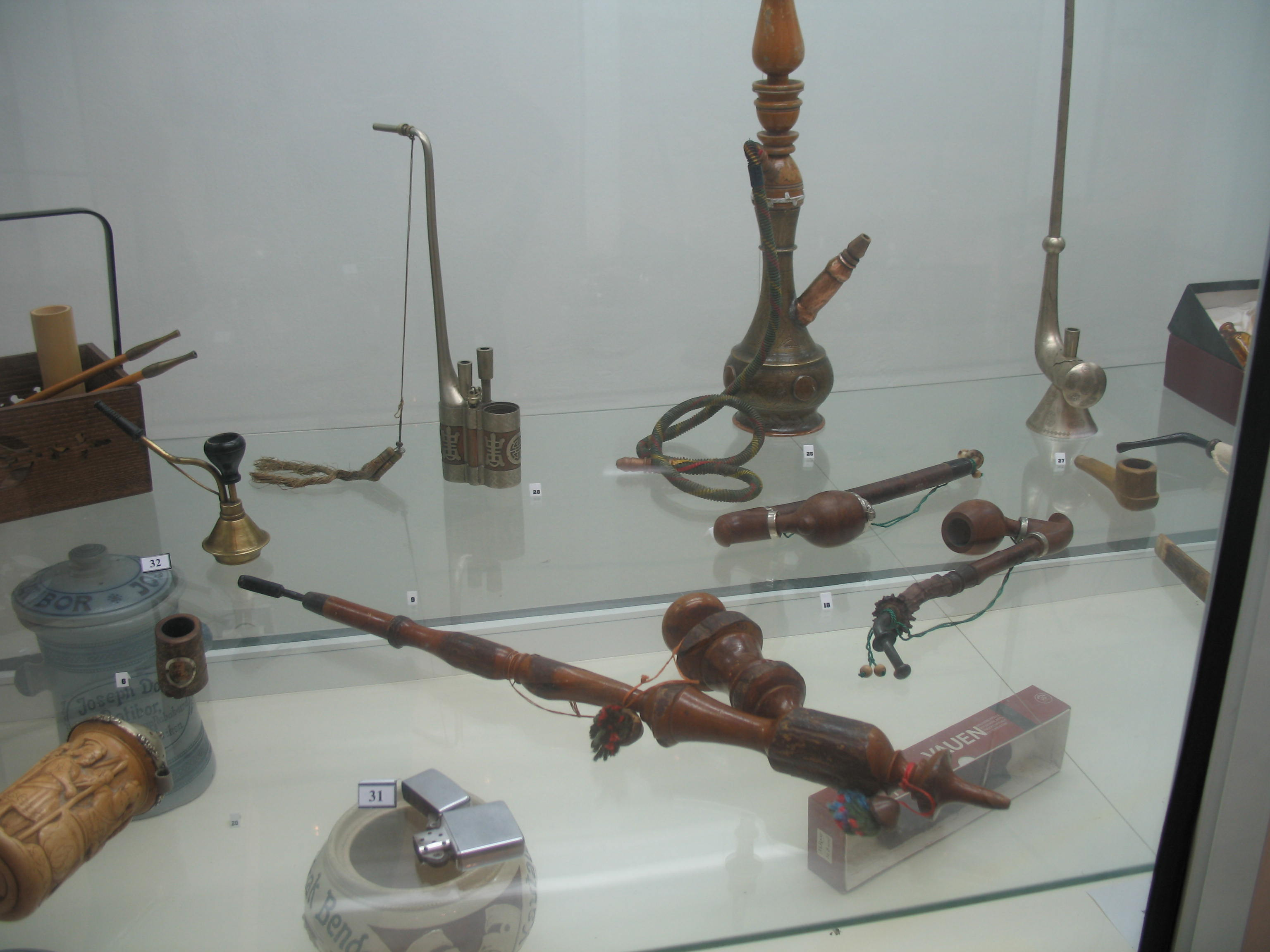 Експонати во Музејот на Тутун од Архивата на Музејот на Тутун, Прилеп.